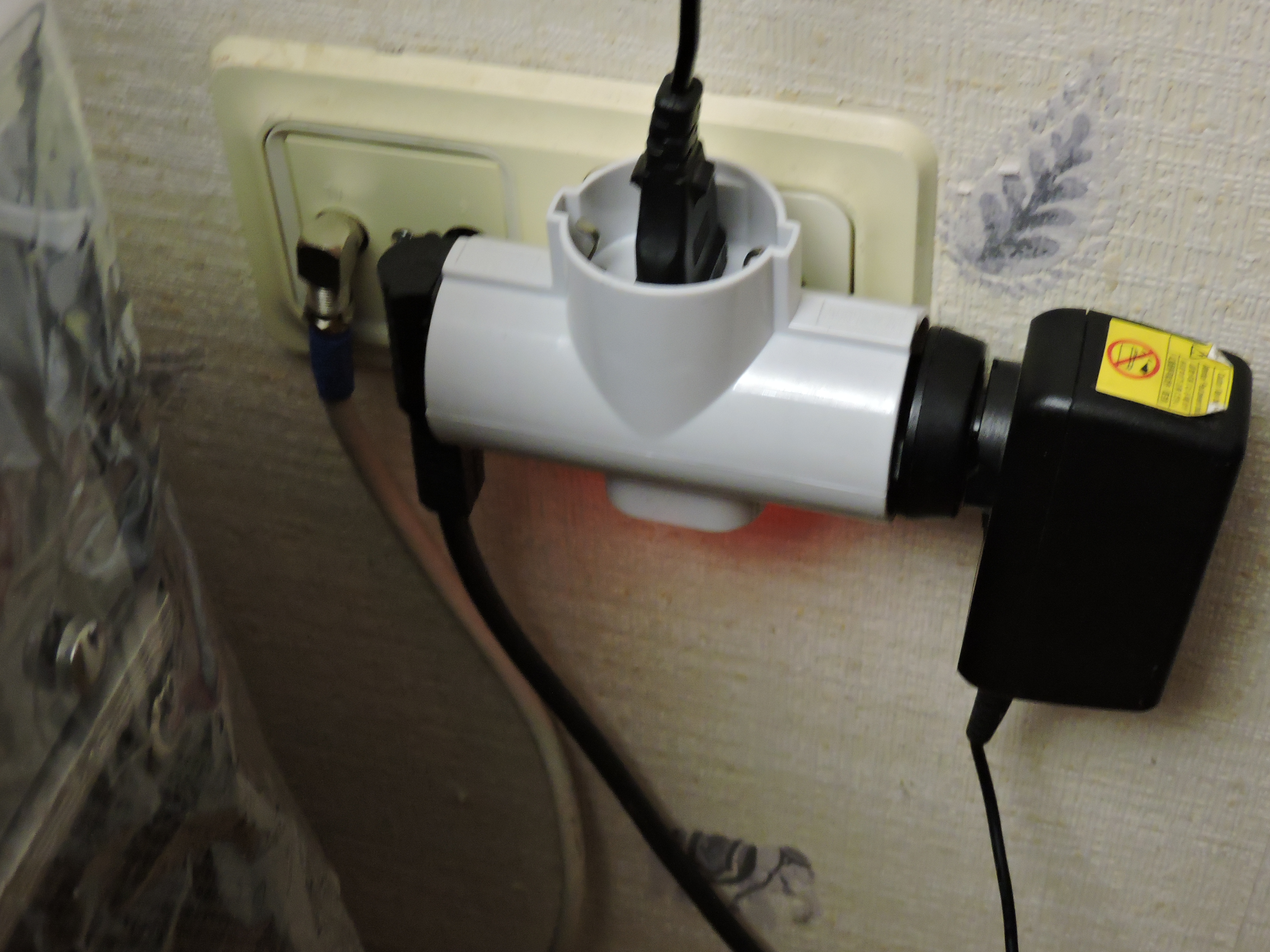 Розетка-тройник